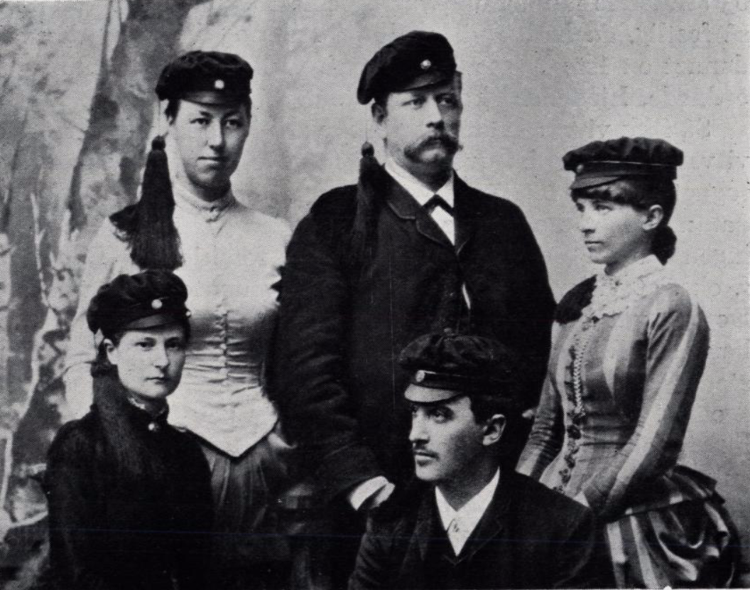 Bak fra venstre: Marie Holst i hvit overdel, praktiserte store deler av livet som lege i Trondheim; løytnant Hall; Minda Ramm. Foran fra venstre: Anna Bugge; candidat Thrane